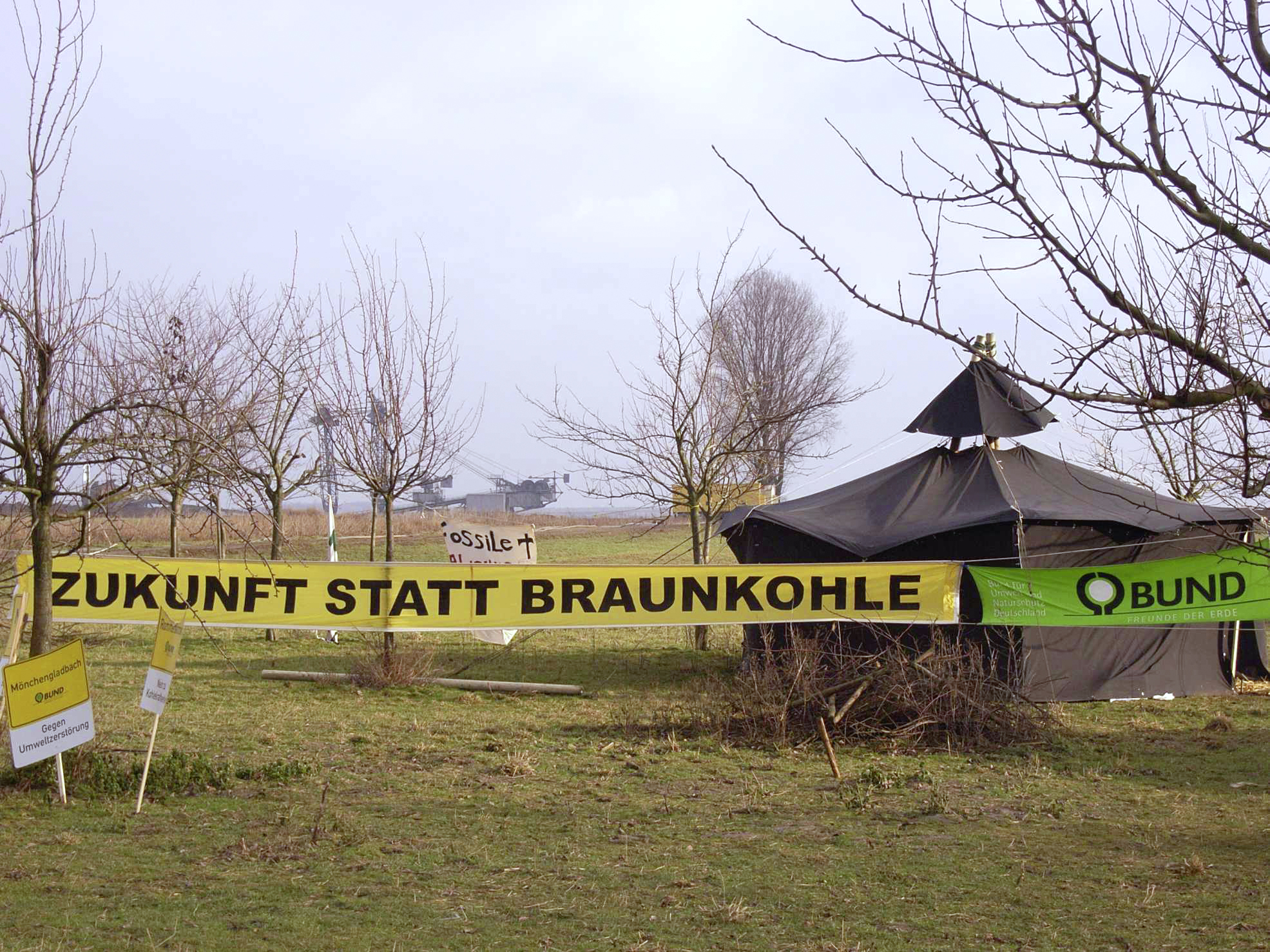 Zeltlager des BUND auf einer Obstwiese bei Otzenrath am Rand des Tagebaus Garzweiler, NRW